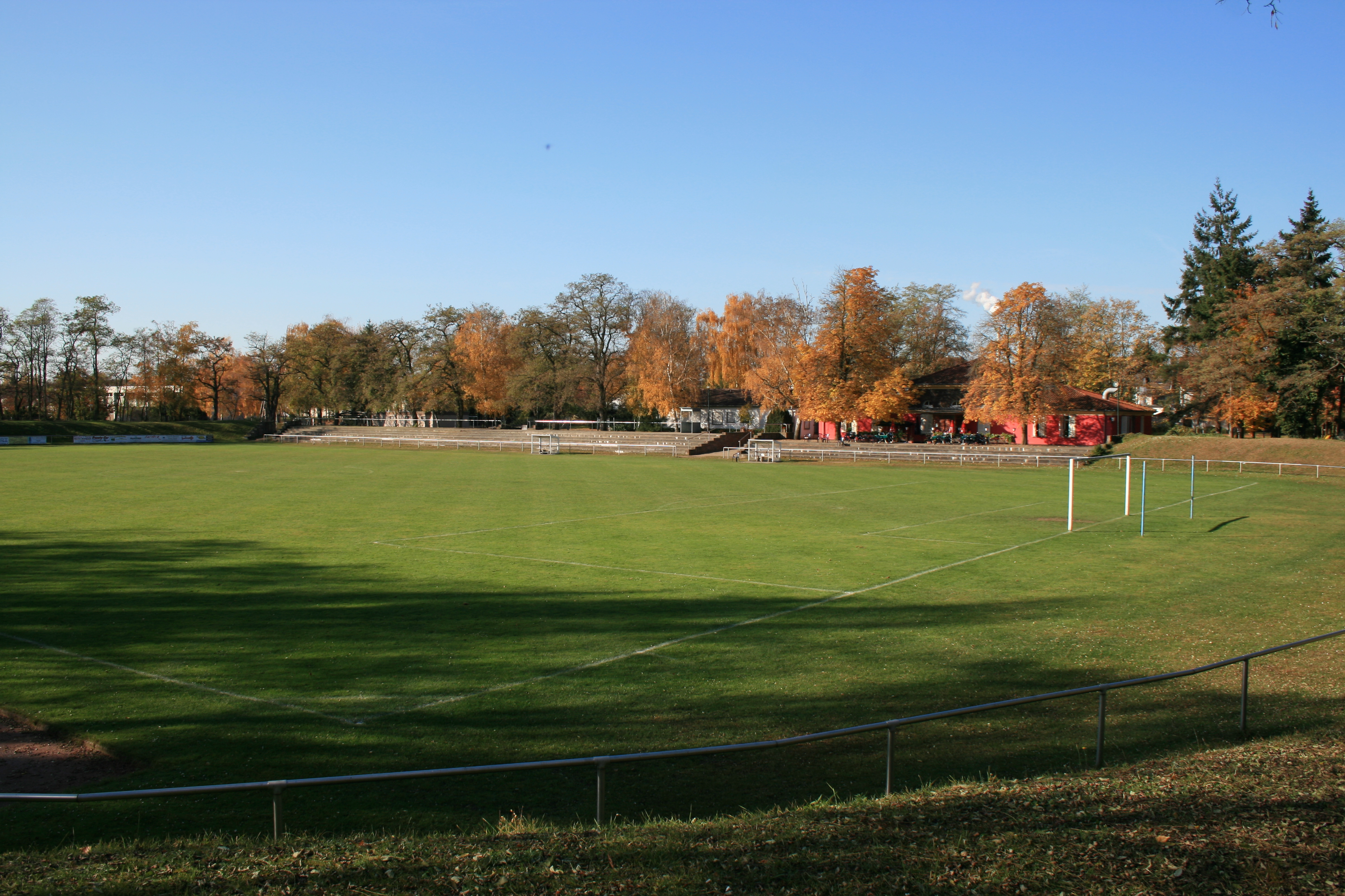 August-Klinger-Stadion Daxlanden